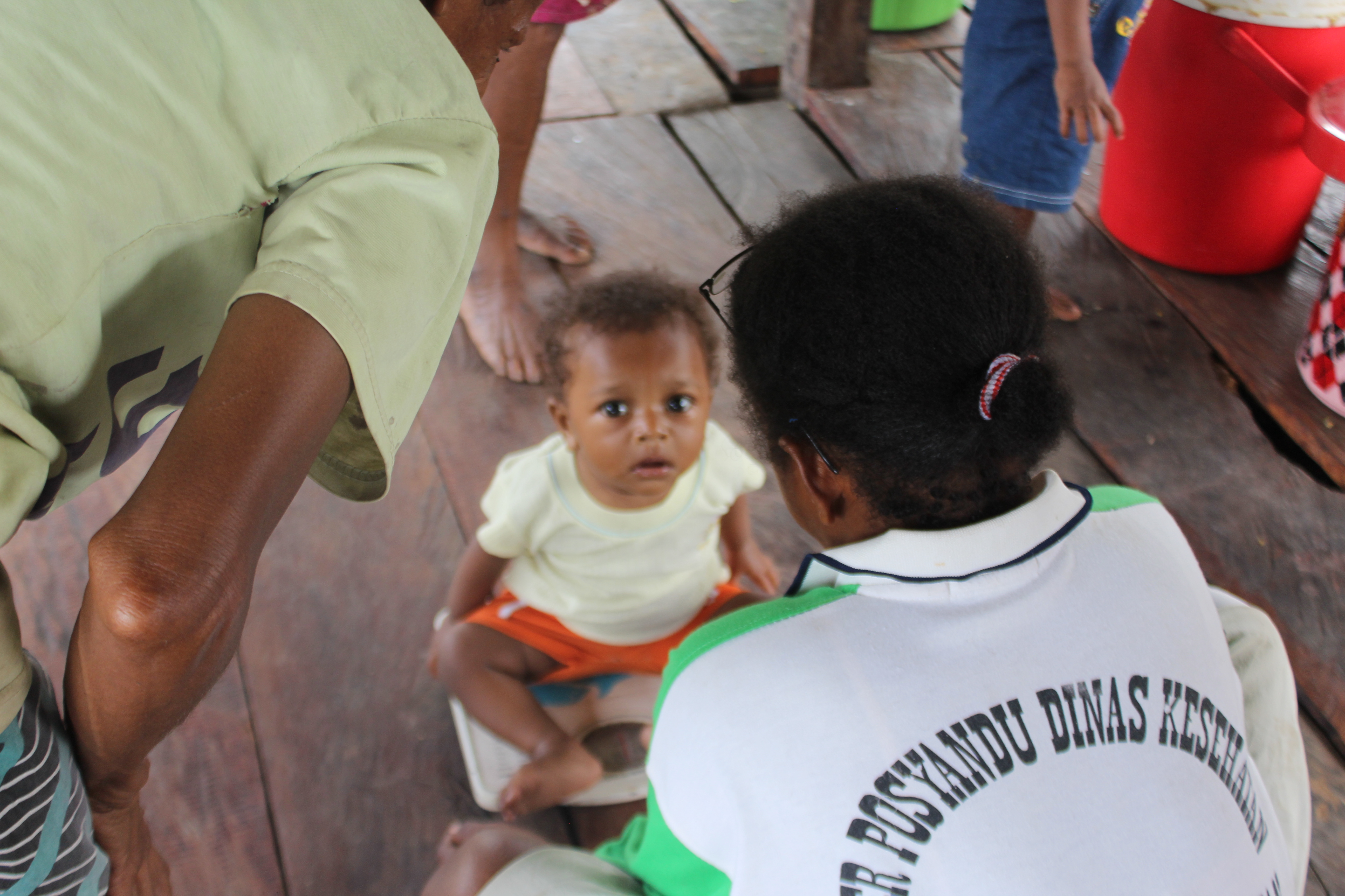 KAMPUNG BENAWA 1. PAPUA BARAT